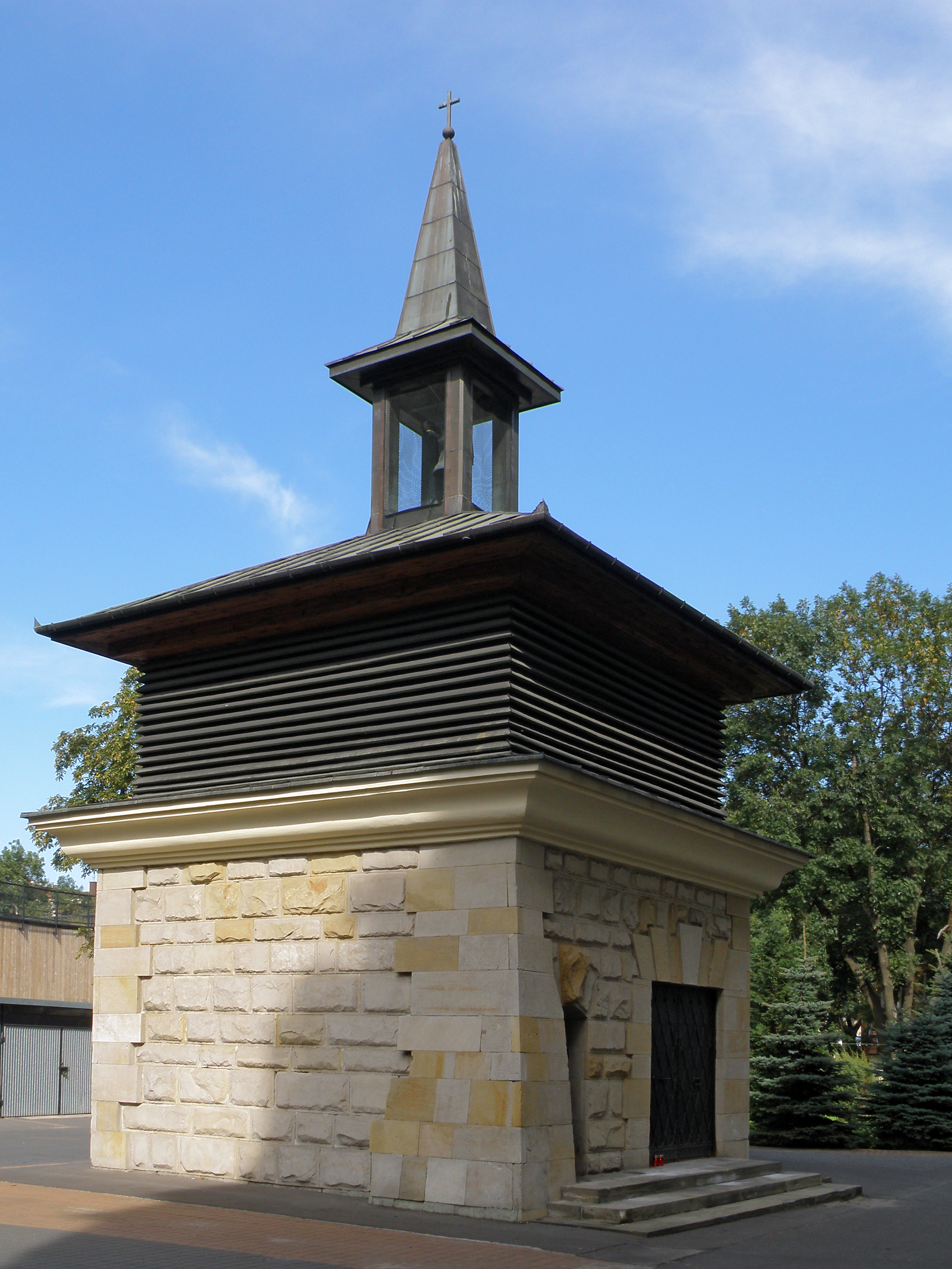 Kościół św. Andrzeja Boboli, ul. Alfreda Nobla 16 w Warszawie - kaplica - parafia Matki Bożej Nieustającej Pomocy